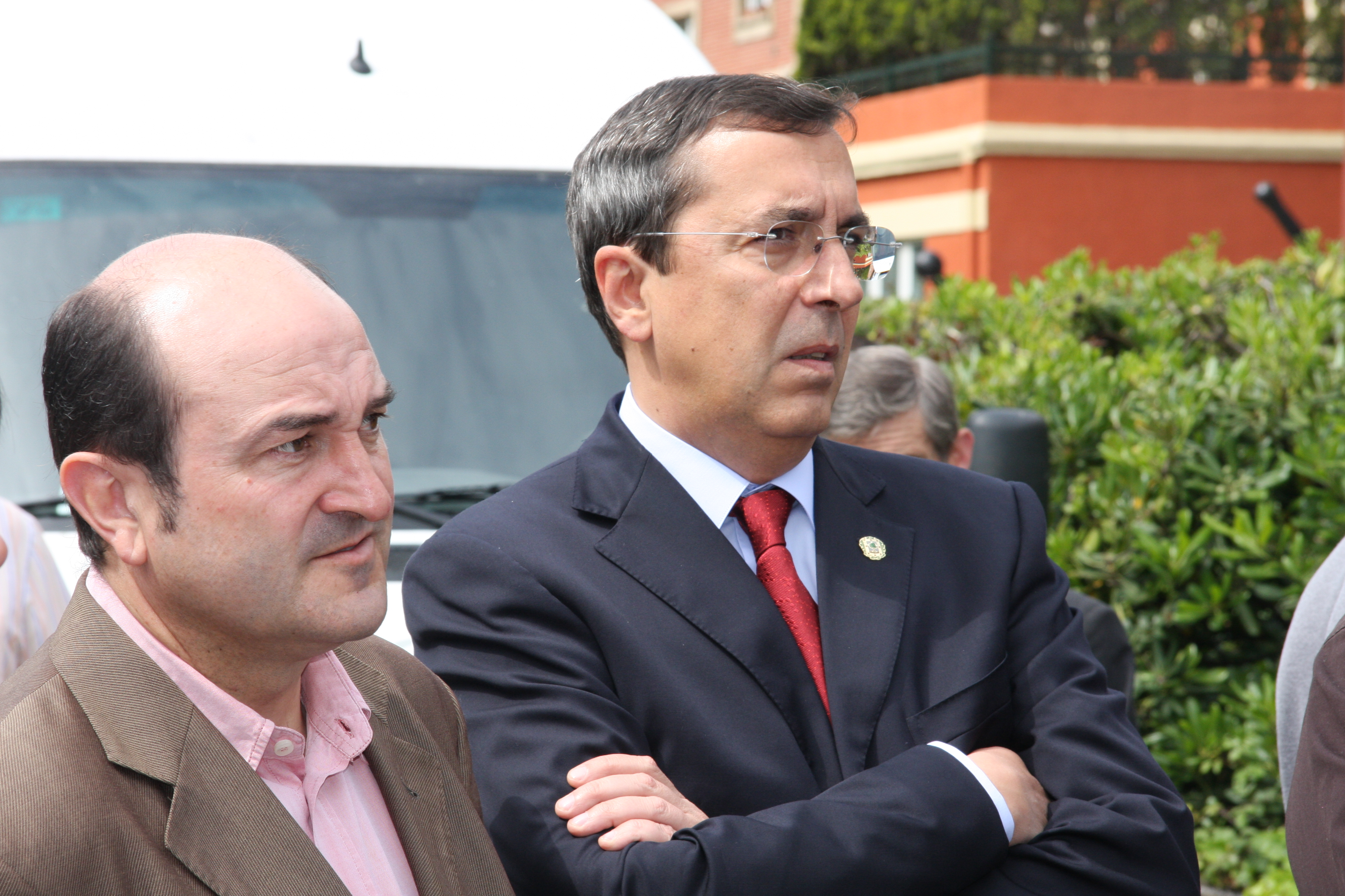 Jose Luis Bilbao eta Andoni Ortuzar.